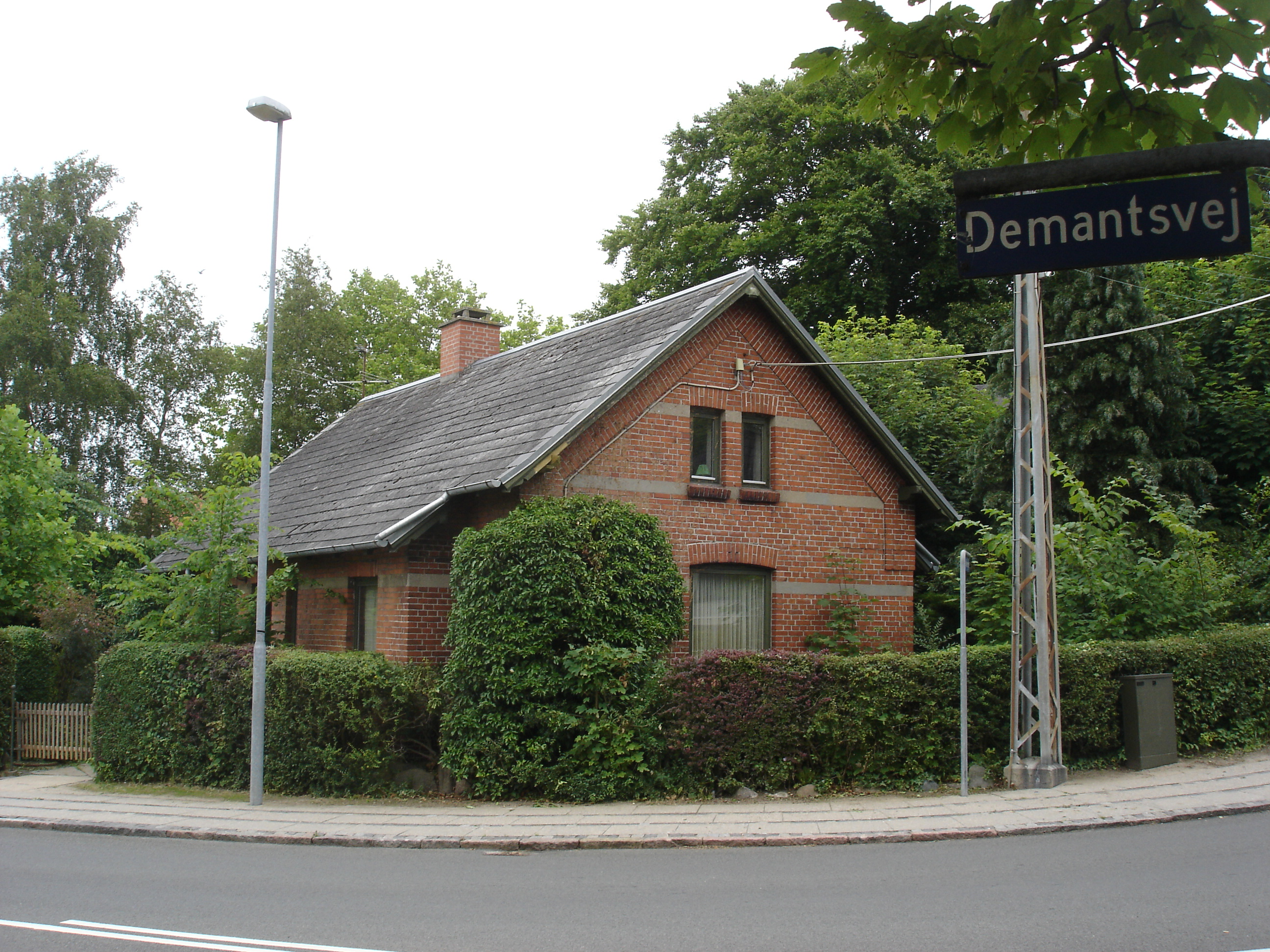 Dalum Billetsalgssted